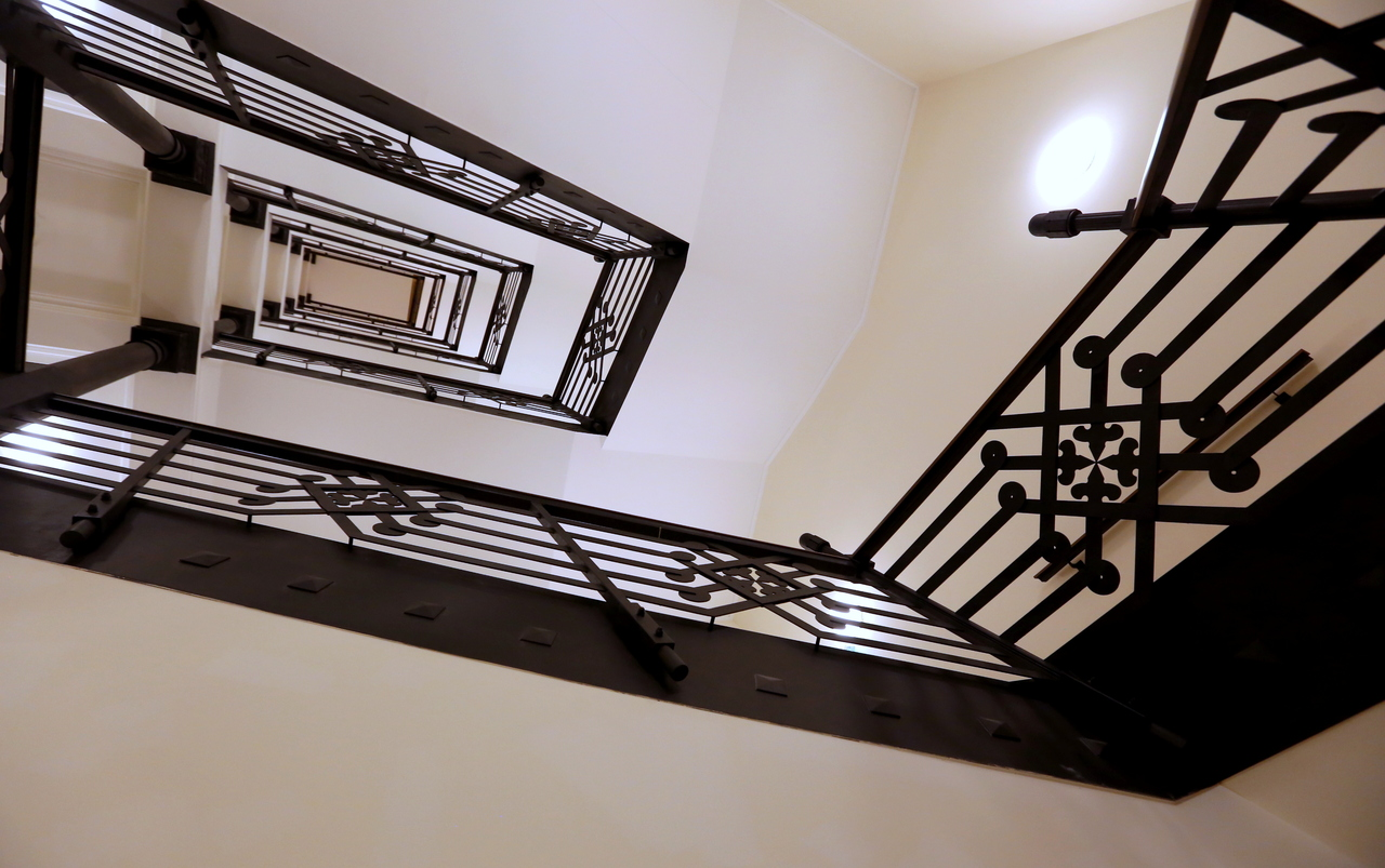 Pesti Vigadó - lépcsóház